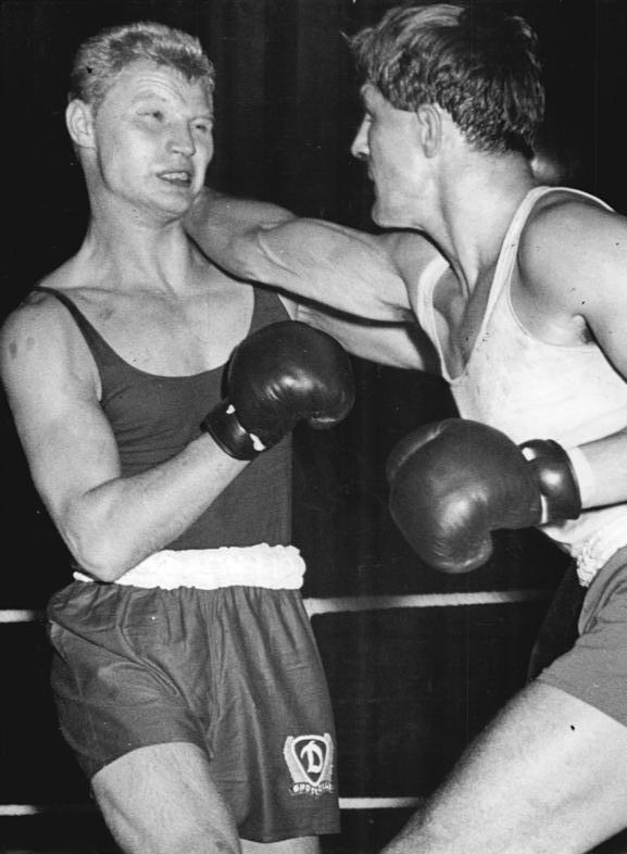 Vielhauer, Walasek Zentralbild Semeniuk 18.9.1963 Internationales Boxturnier in Berlin eröffnet Mit 13 Begegnungen begann am 17.9.1963 om der Gewichtsklassenturnier im Boxen der SV Dynamo, an dem insgesamt 51 Faustkämpfer aus Polen, der UdSSR, Ungarn, der CSSR, Bulgarien und der DDR teilnehmen. UBz: Im Mittelpunkt siegte Ex-Europameister Walasek (Polen-rechts) gegen Vielhauer (DDR) nach Punkten.